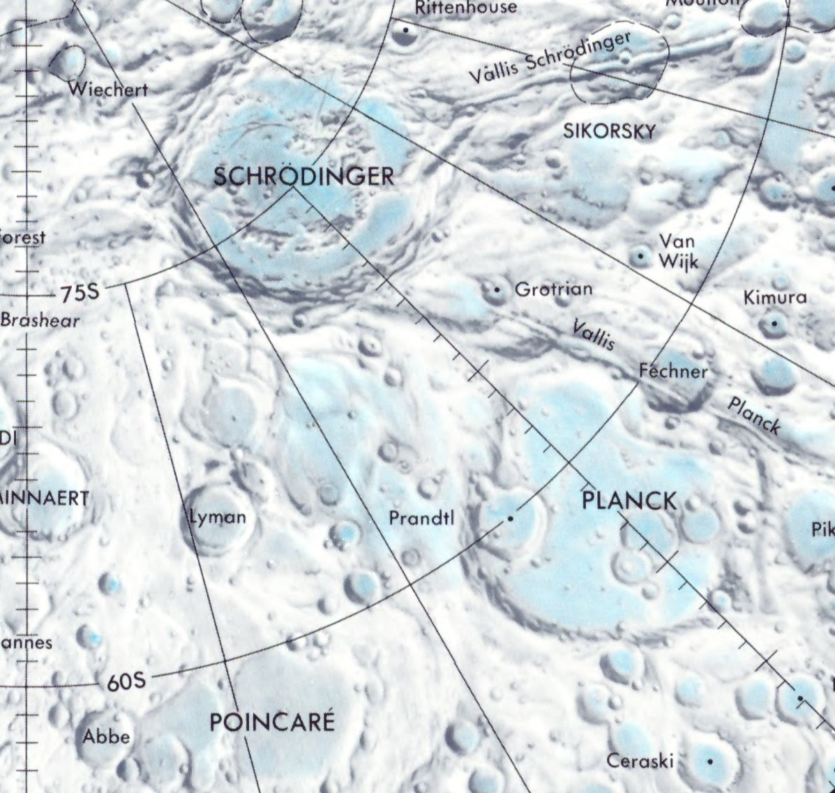 Cráter lunar Planck. Situación. (Lunar Chart LPC-1. NASA)